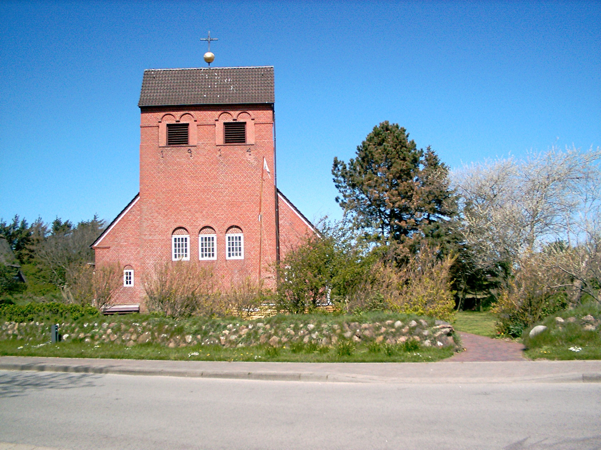 Ort: Sylt (Kirche - Weningstedt) (13. Mai 2005)